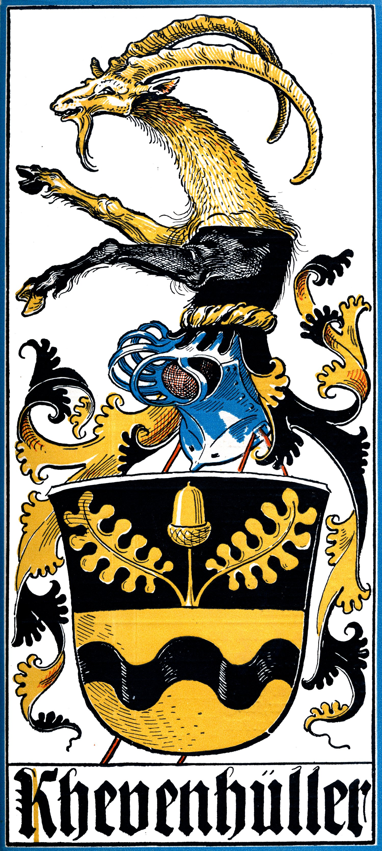 Wappen derer von Khevenhüller